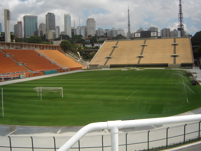 Interior do estádio do Pacaembu em São Paulo